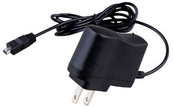 மின்கலம் மின்னூட்டல்